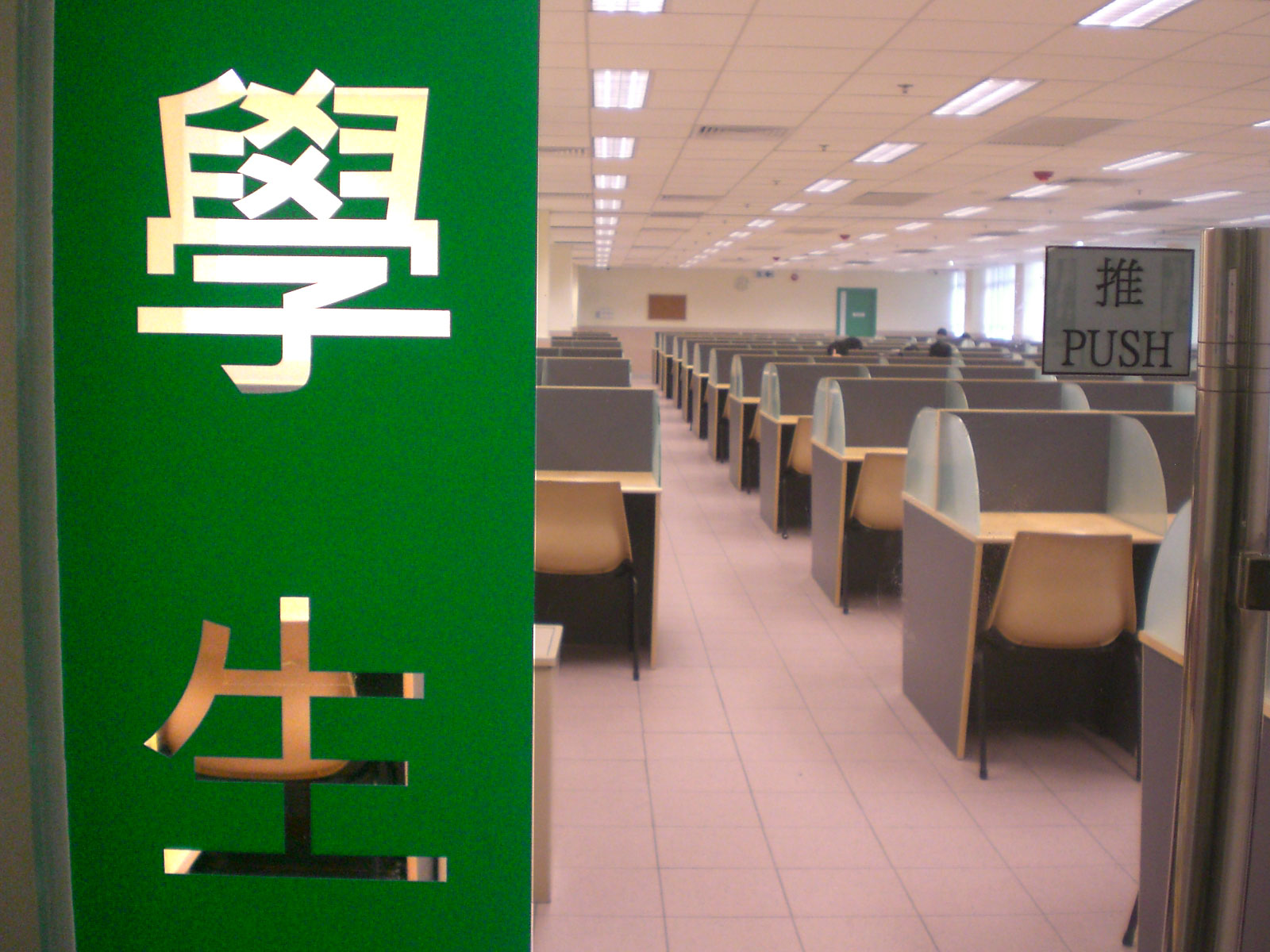 自修室 self-made by TeresaKen